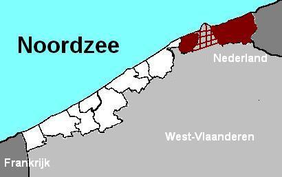 Zelf gemaakt kaartje van de Oostkust met Blankenberge, Zeebrugge, Knokke-Heist